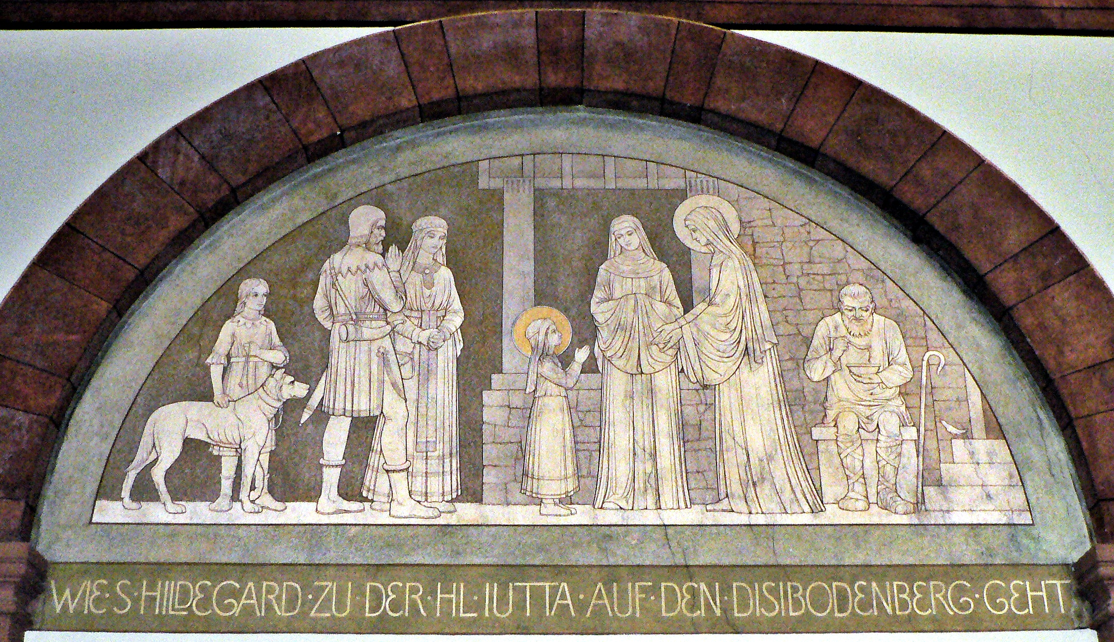 St. Hildegard von Bingen und St. Jutta von Sponheim, Kloster Eibingen